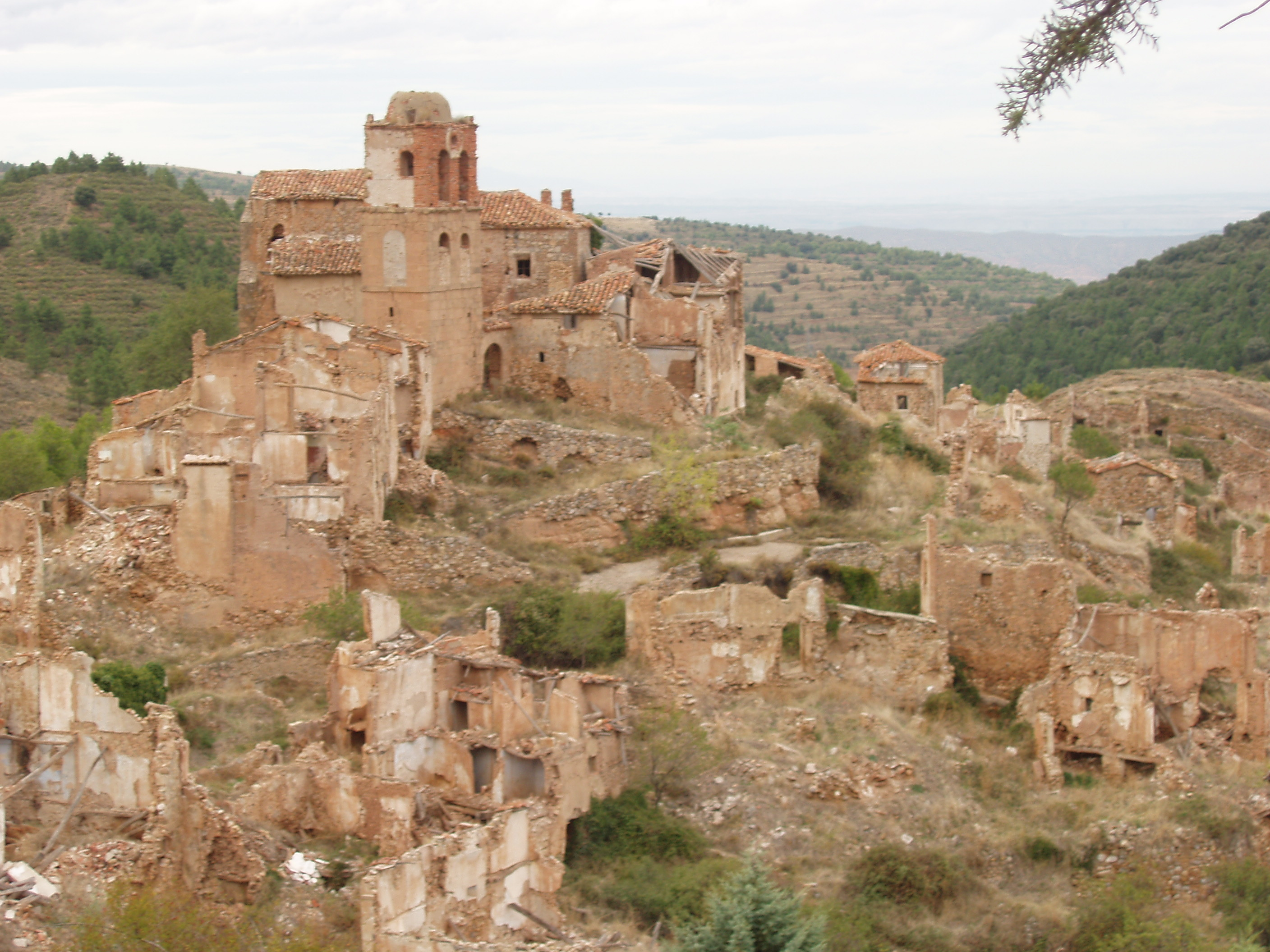 Turruncún (La Rioja, España), de más cerca